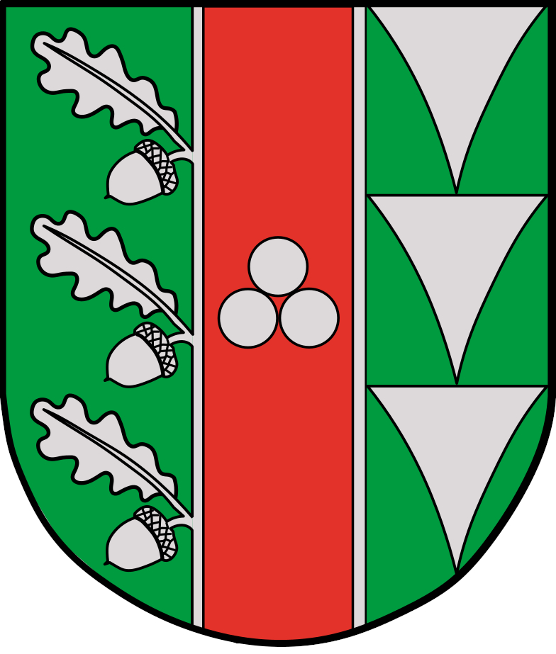 Das Wappen vereint Farben und Elemente aus den beiden Wappen der Vorgängergemeinden.